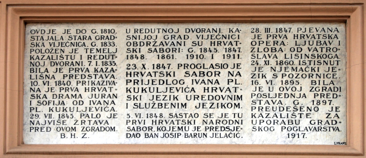 spomen ploča na staroj gradskoj vijećnici u Zagrebu